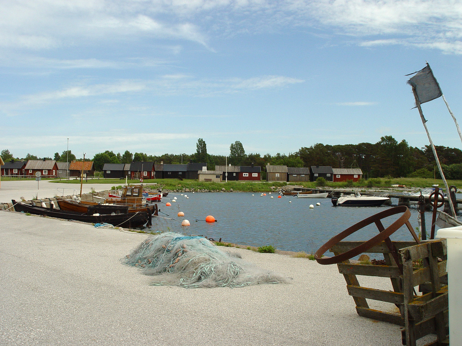 Fischerstelle auf Gotland: Fischerdorf Gnisvärd, einst Gotlands größtes Fischerdorf, bekam 1669 Hafenrecht. Lage: 20 km sw Visby